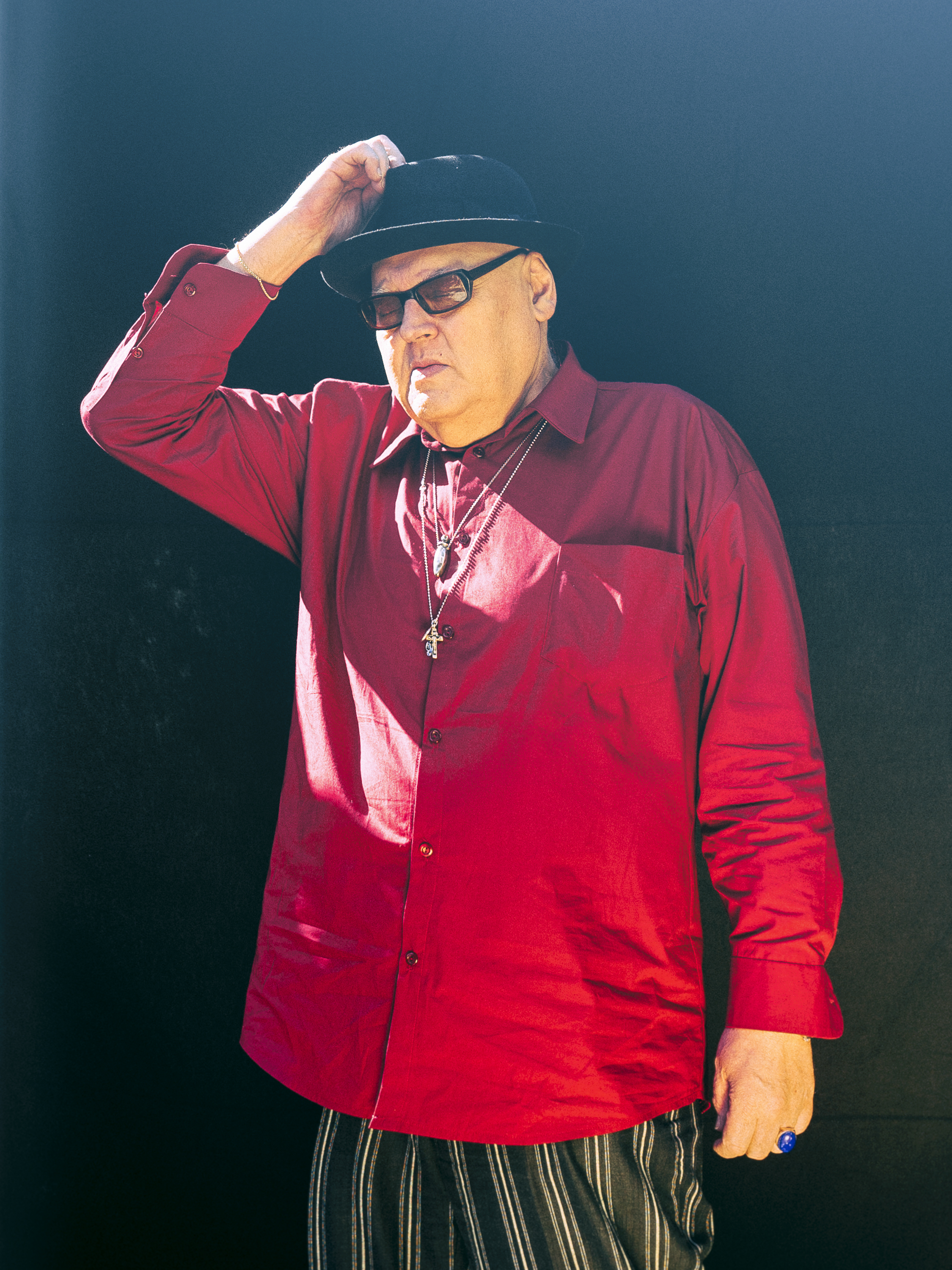 Karl Ratzer, 2018. Direction and Photography: Lennart Horst